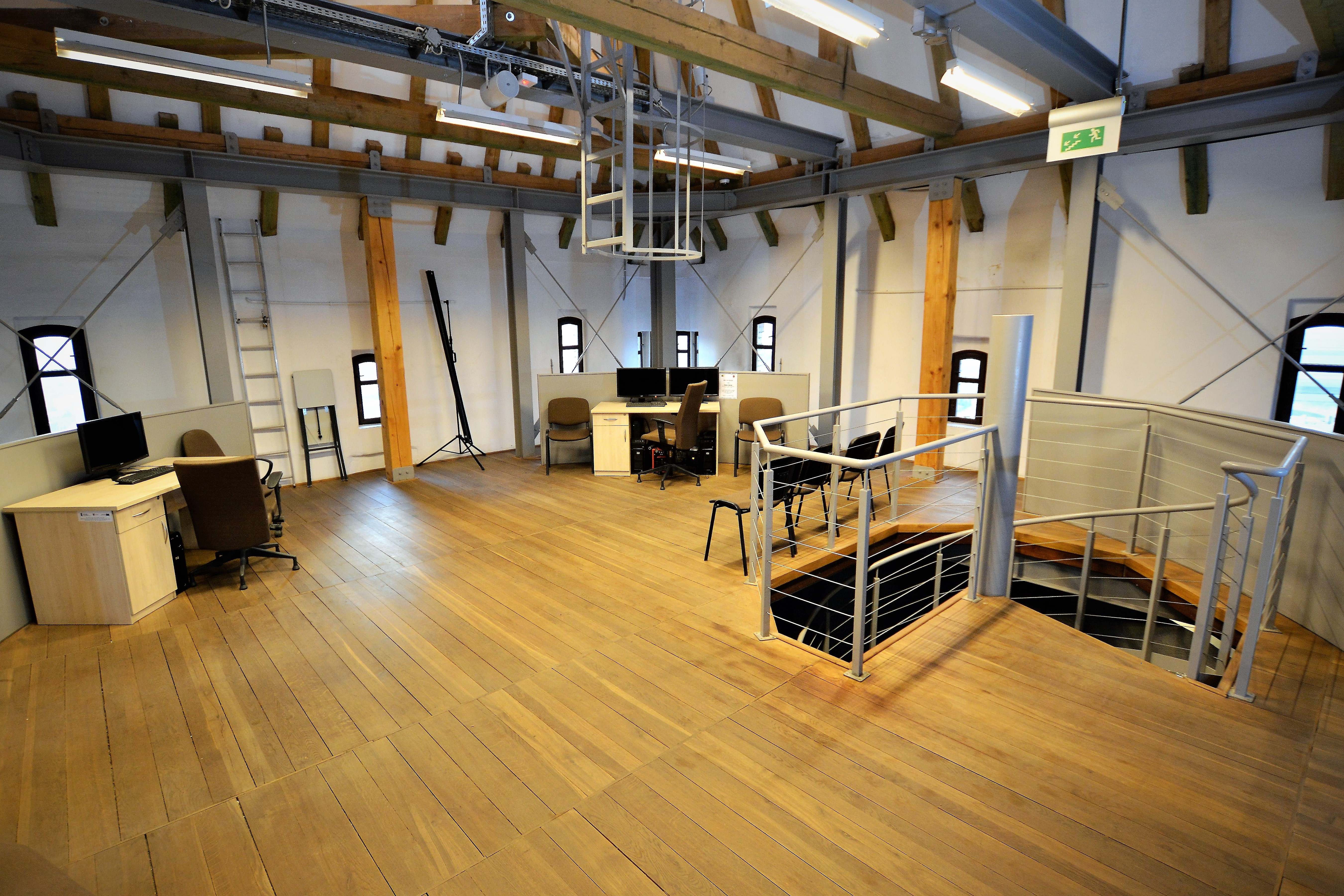 Siedziba obserwatorium astronomicznego w wiezy cisnien